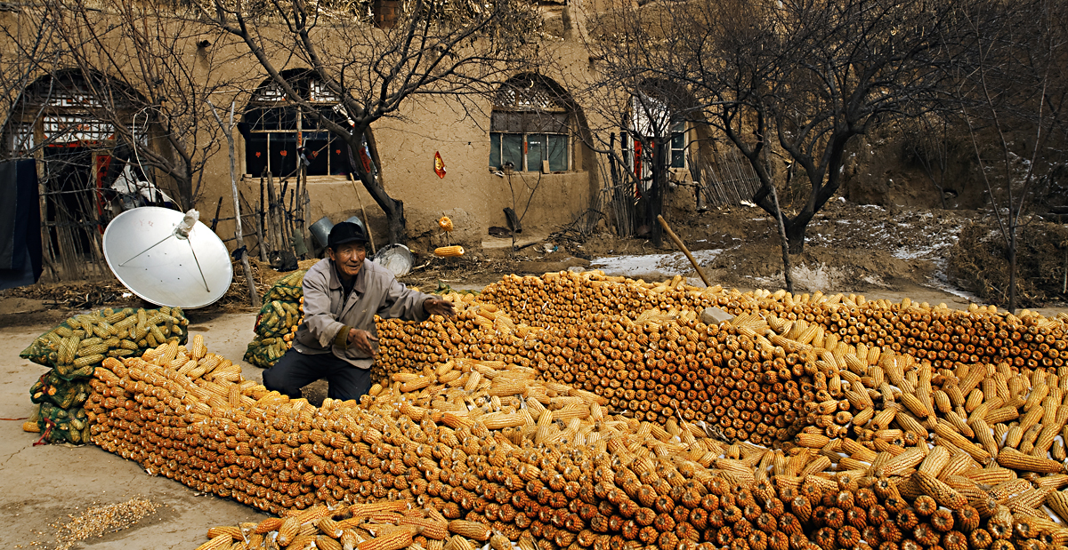 河北张家口怀安乔子沟窑房